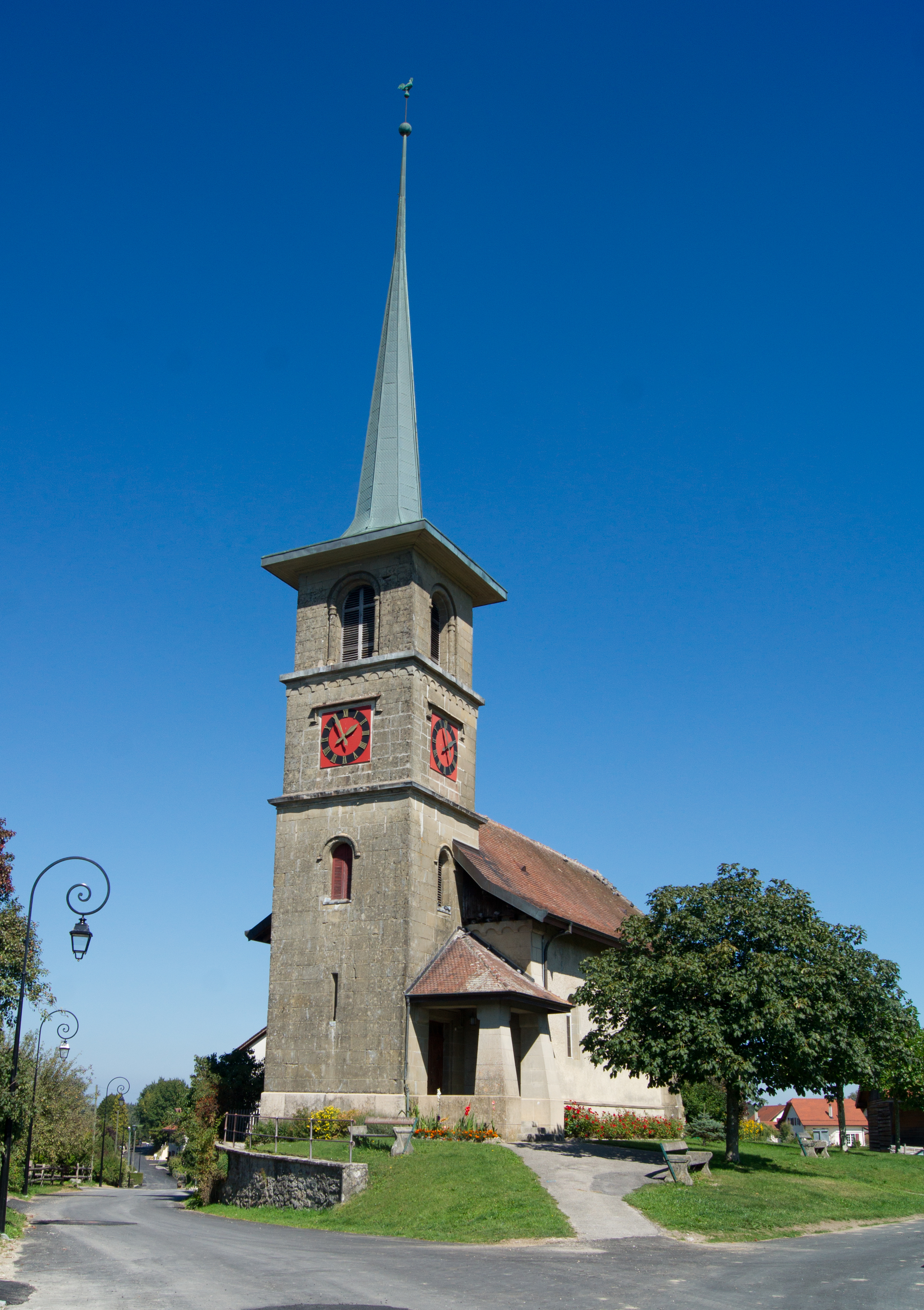 Église de Poliez-le-Grand, canton de Vaud, Suisse.